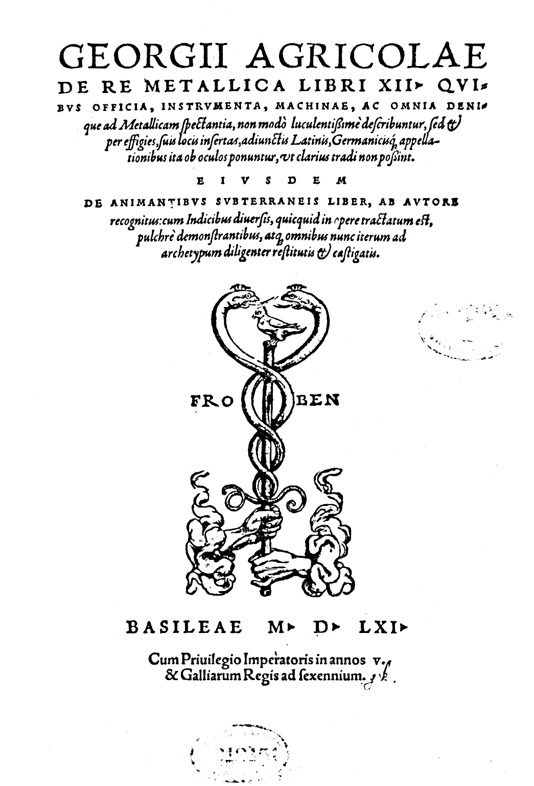 De re metallica title page